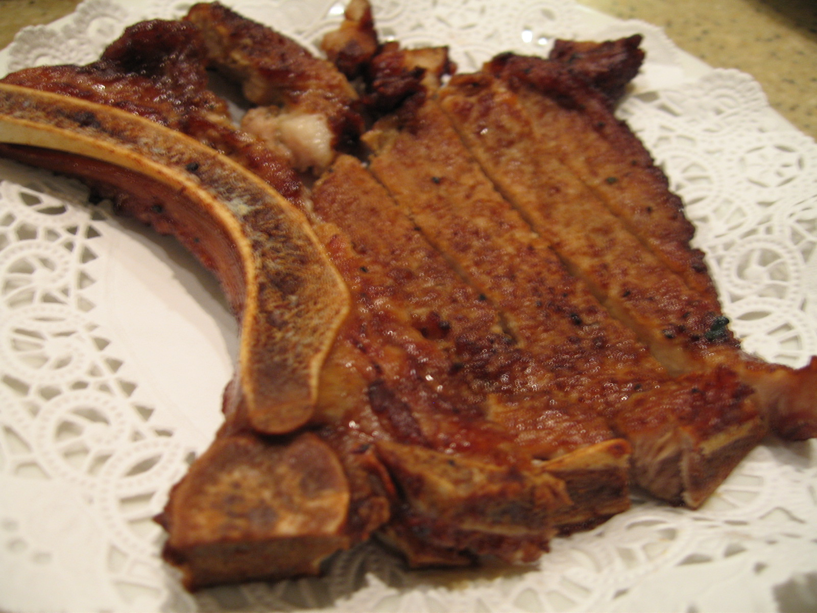 (Taken by Pengrin.)